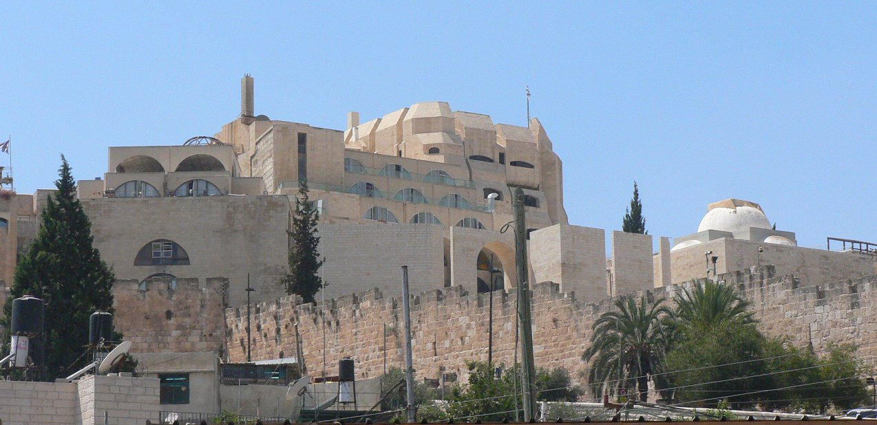 Yeshivat Hakotel, Jerusalem, Israel ישיבת הכותל , ירושלים בירת ישראל Author: MathKnight